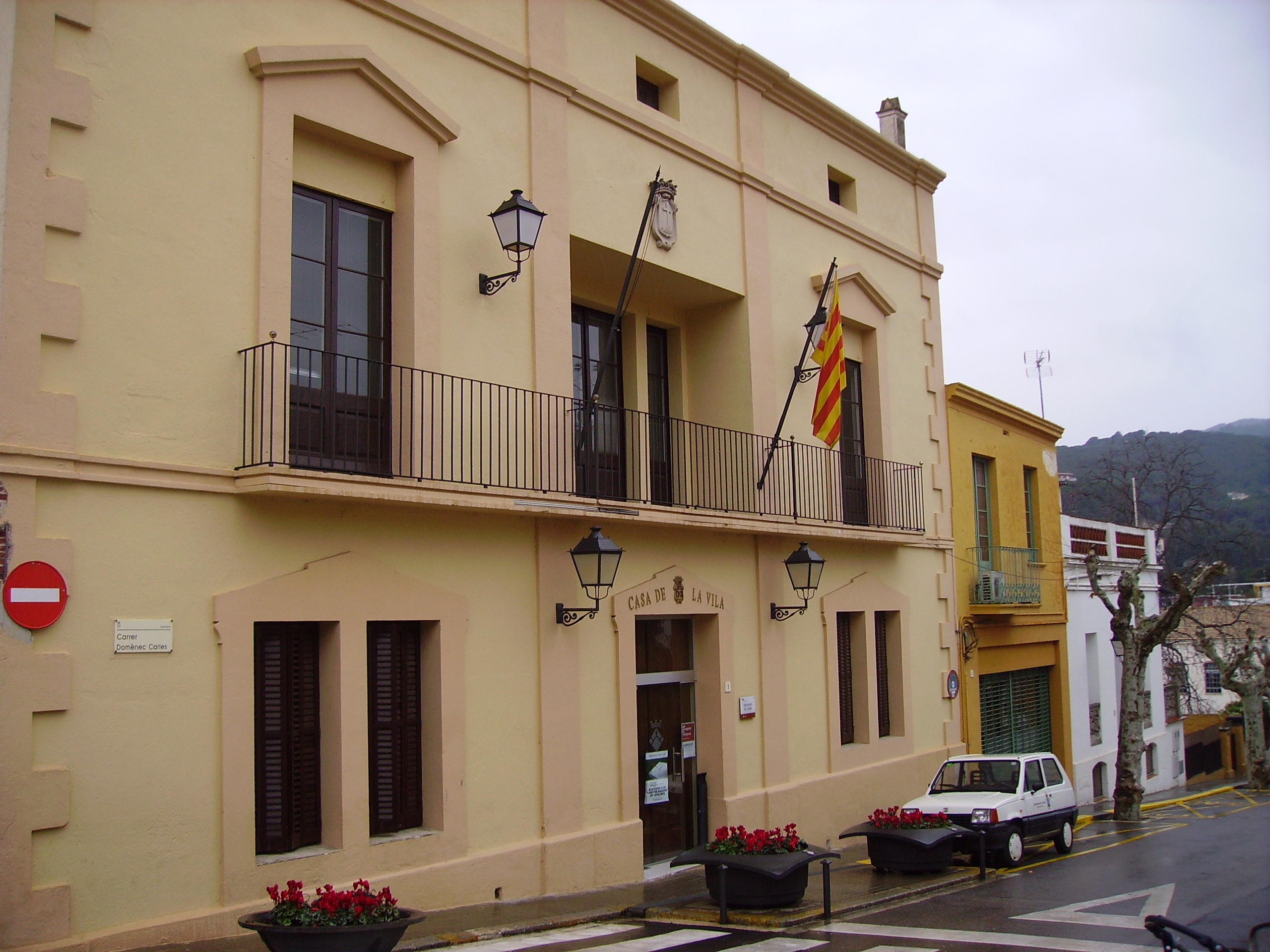 Ajuntament de Cabrils, El Maresme, Catalunya.